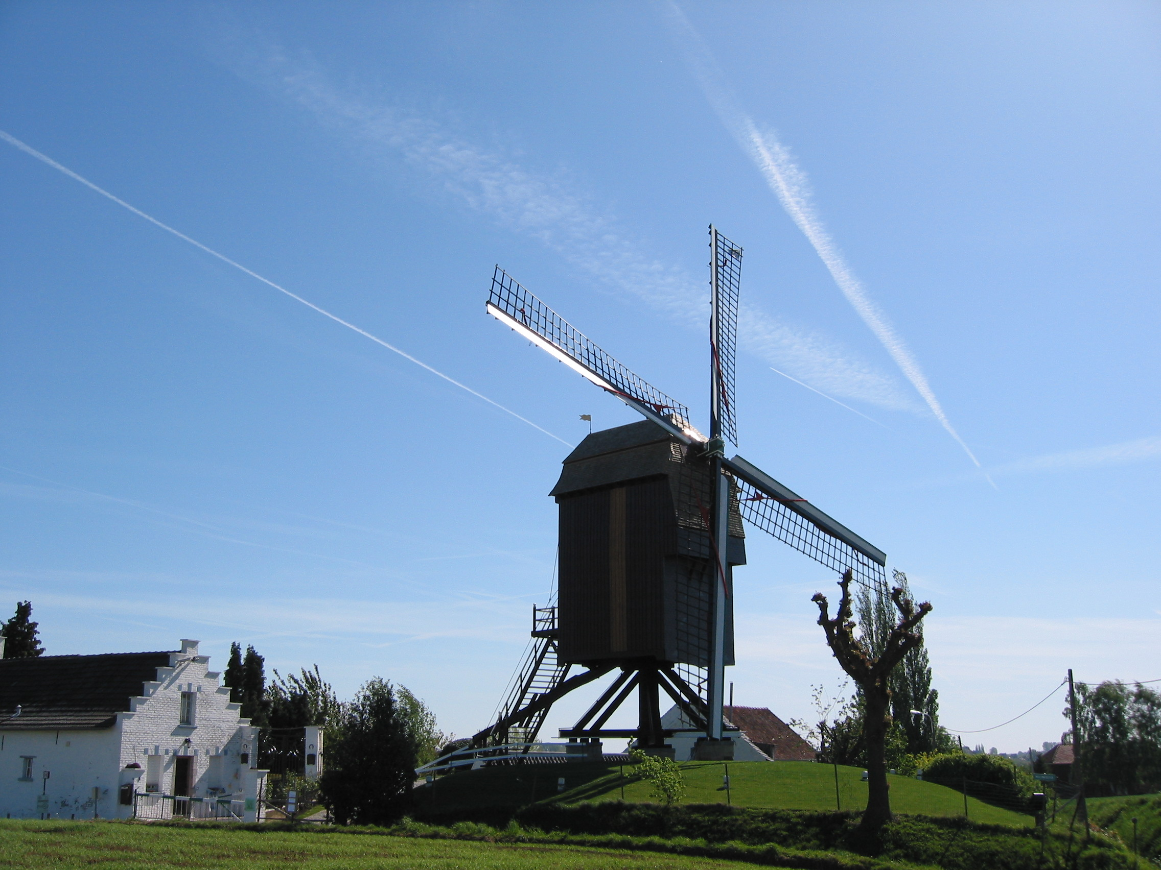 Roosdaal - OLV Lombeek - Hertboommolen This photo of immovable heritage has been taken in the Flemish Region